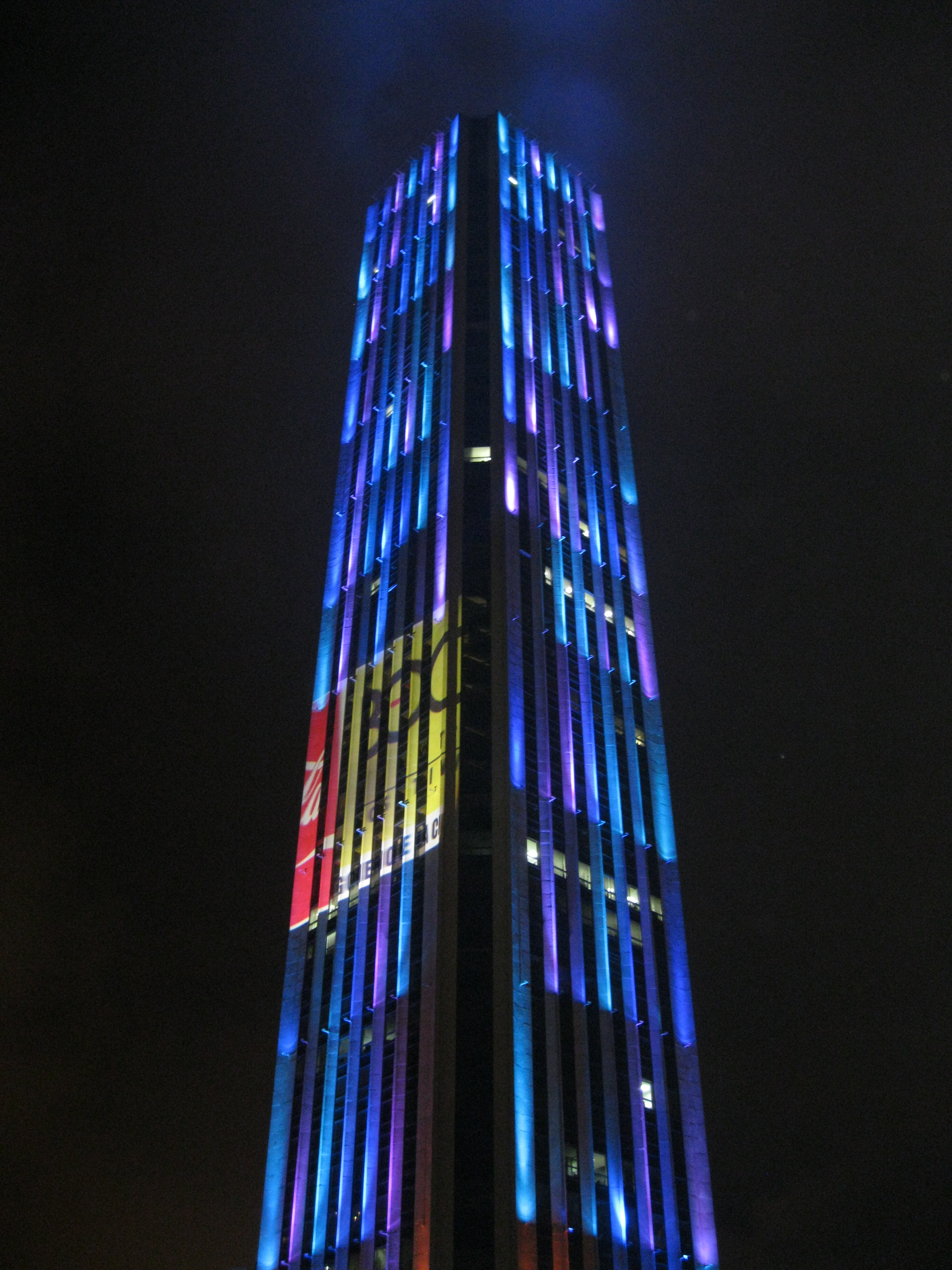 Torre Colpatria en diciembre de 2011